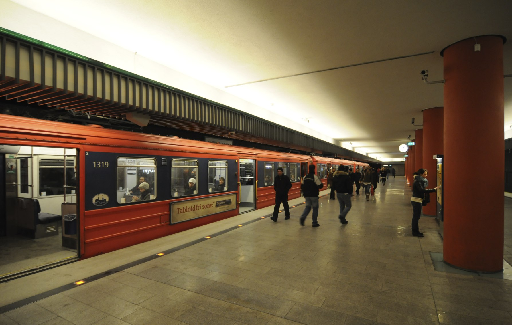 T1300 T-banevogn på Nydalen stasjon